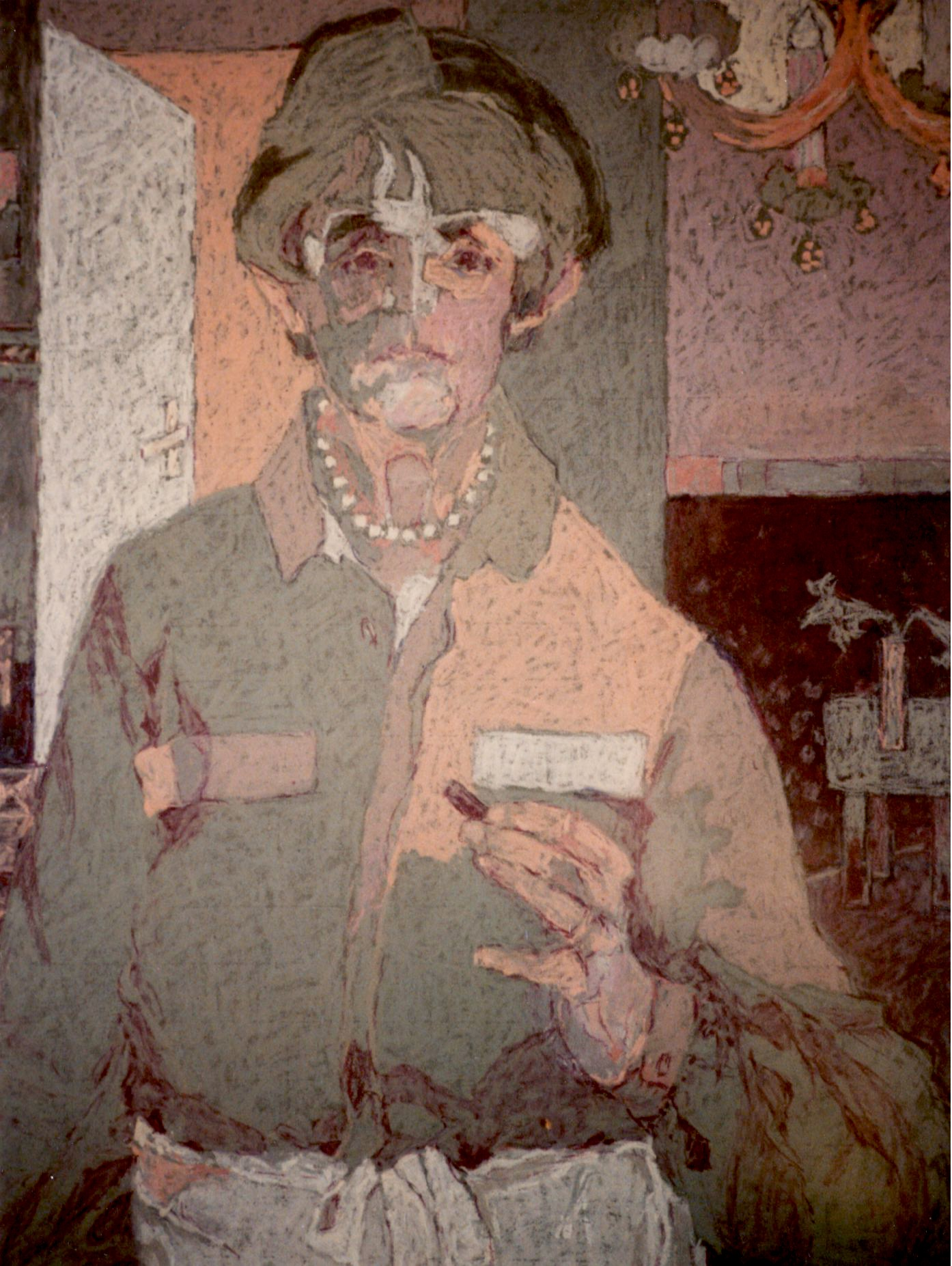 Die Malerin Käthe Ricken schuf dieses Kunstwerk.